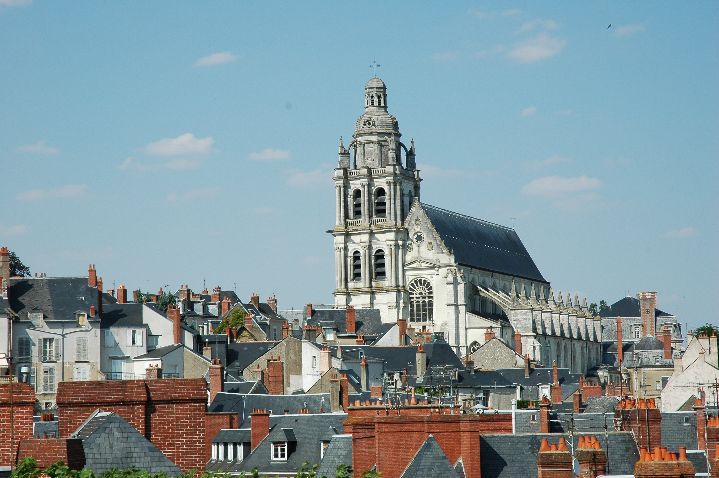 France Loir-et-Cher Blois Cathédrale SaintLouis Photographie prise par Patrick GIRAUD